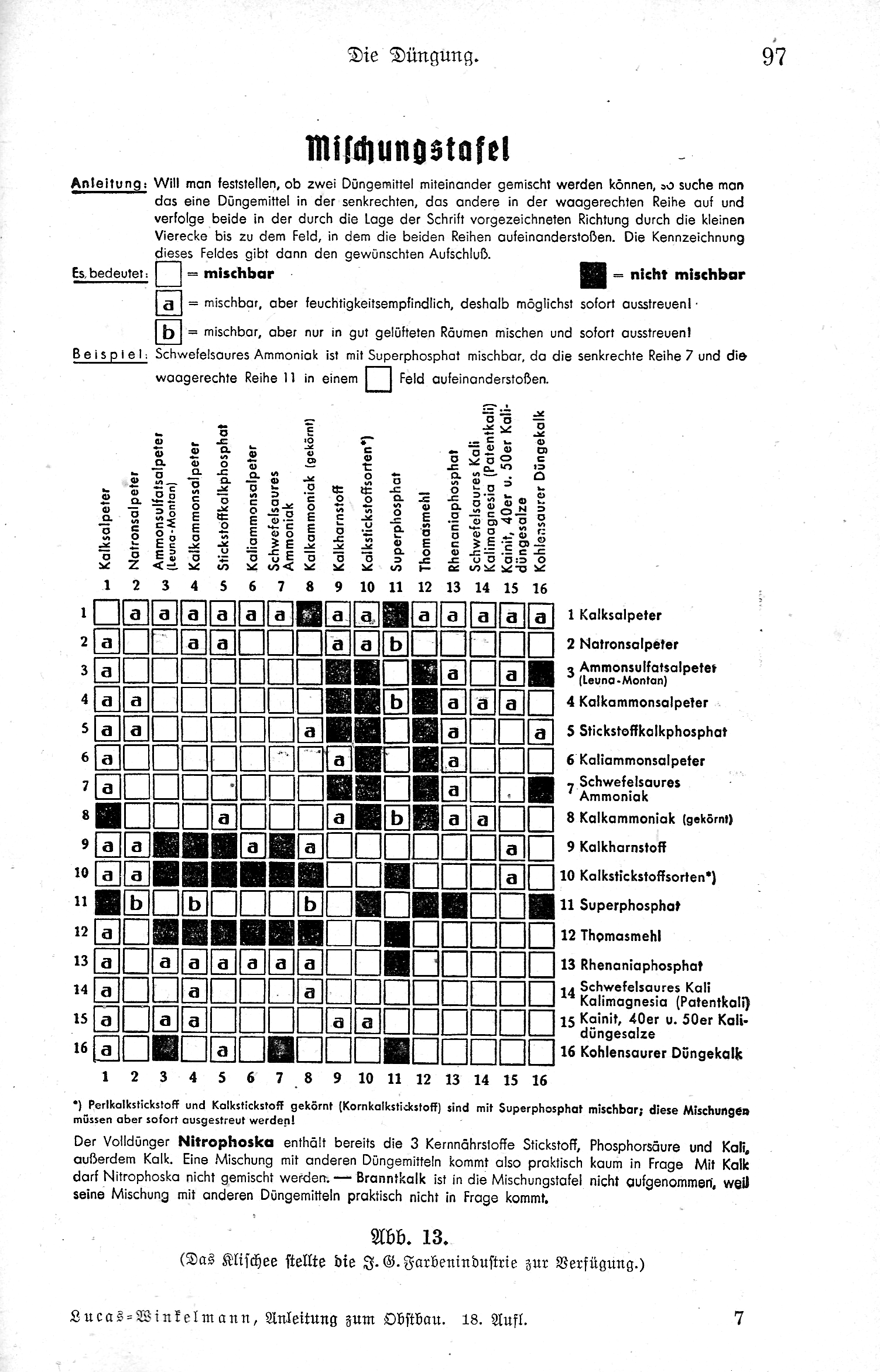 Düngemittel-Mischungstafel. Vor 1940.